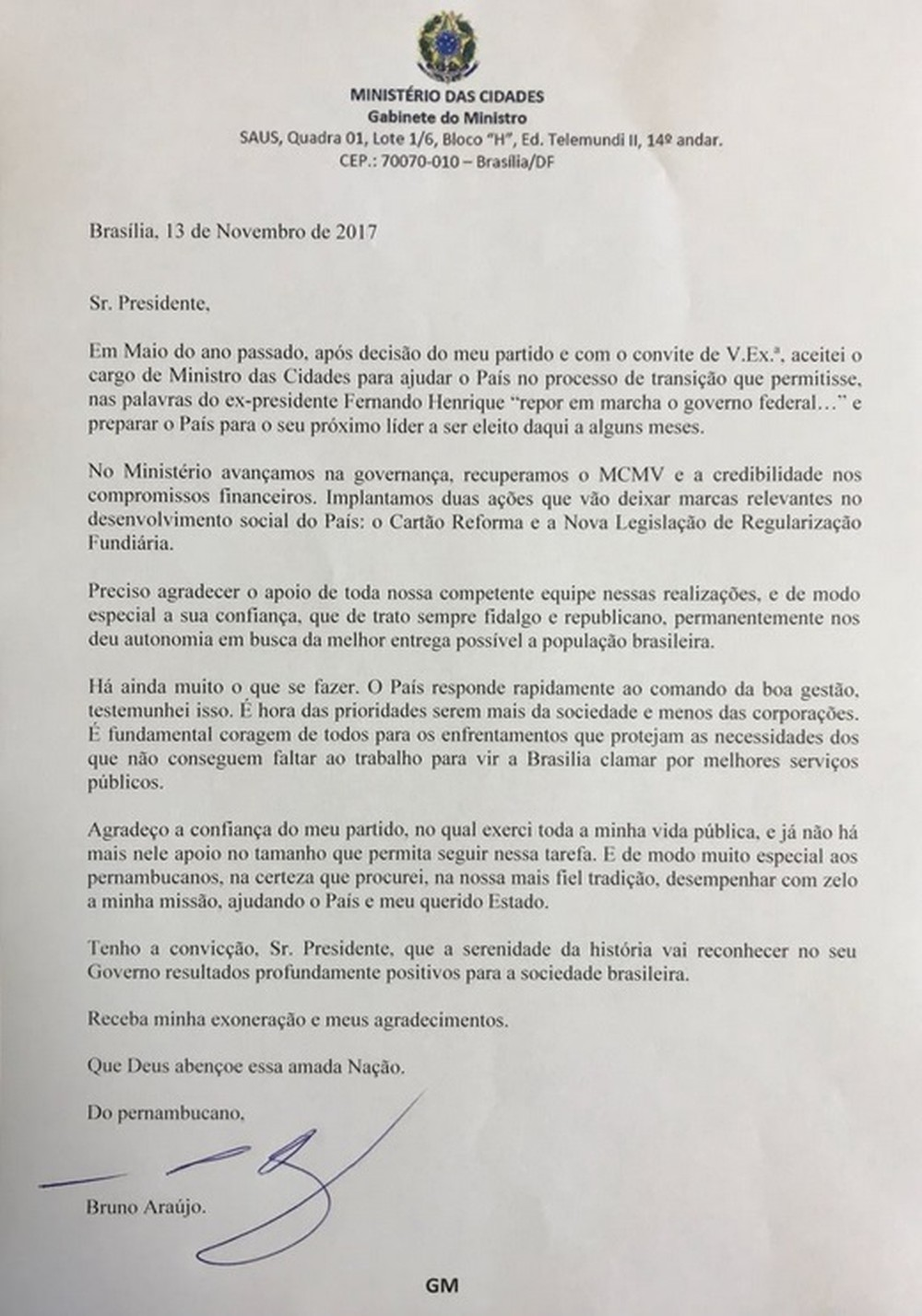 Carta de Bruno Araújo como Ministro das Cidades.